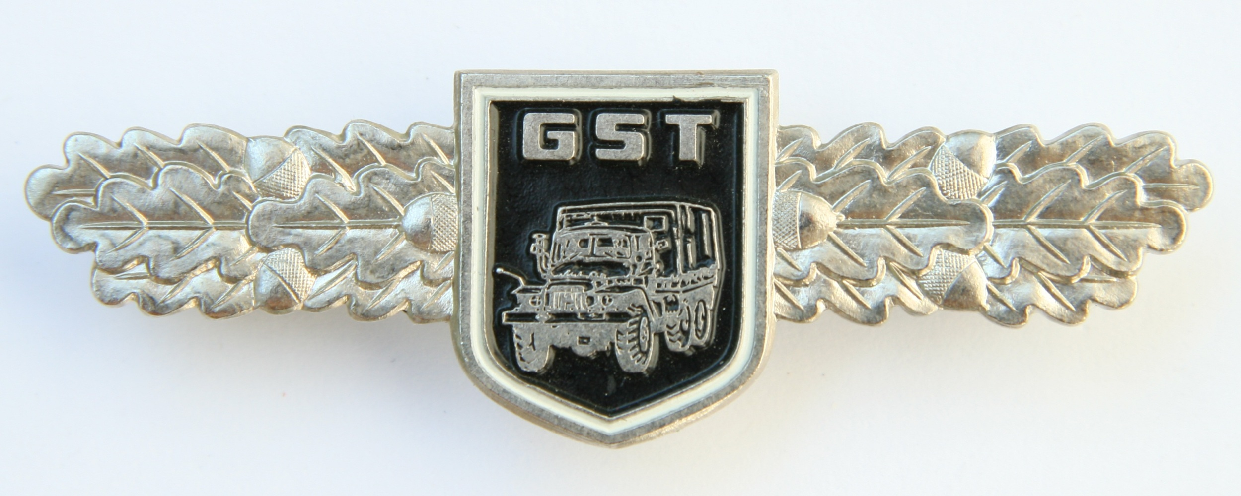 Qualifikationsspange der Gesellschaft für Sport und Technik, DDR, 1980er Jahre, Breite 80 mm